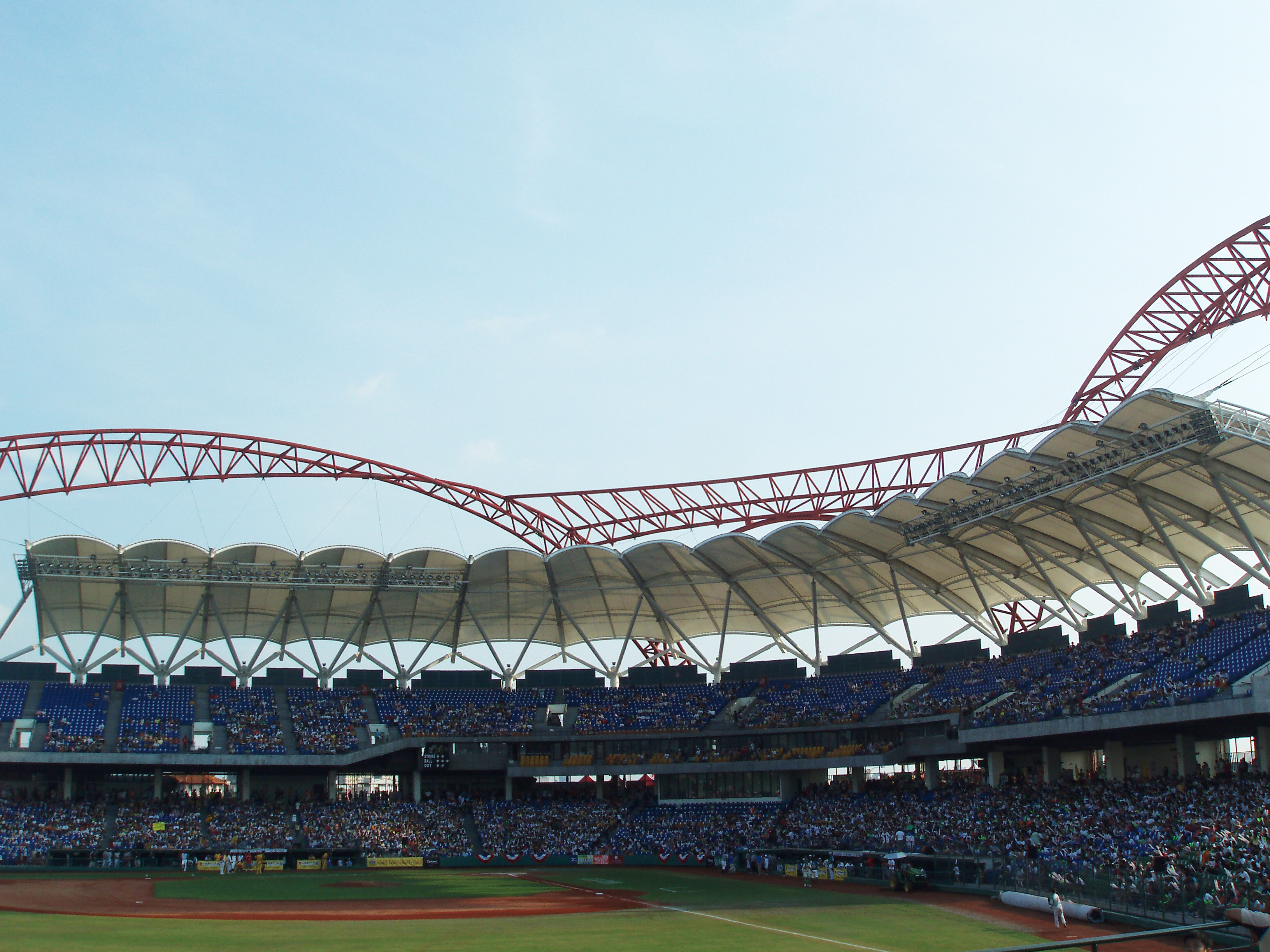 2008.07.20，台中洲際棒球場，中華職棒明星賽 Bân-lâm-gú: 2008.07.20, Tâi-tiong Tsiu-tsè Pāng-kiû-tiûnn, Tiong-huâ Tsit-pāng bîng-tshenn-sài.